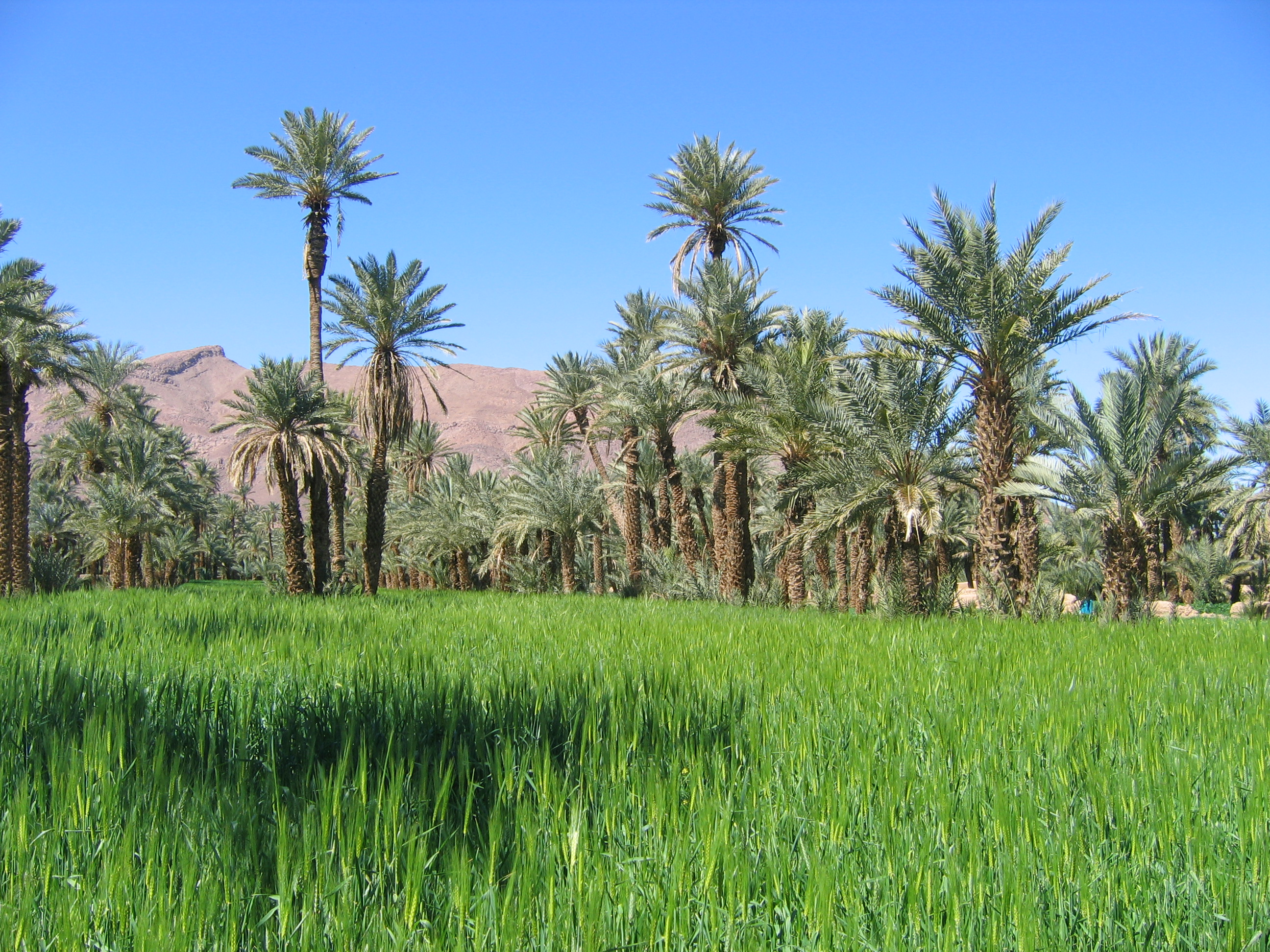 Culture de céréales dans une oasis